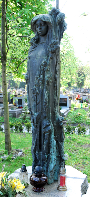 Rzeźba nagrobna Barbary Kwiatkowskiej-Lass wykonana przez wybitnego rzeźbiarza - Mariana Koniecznego